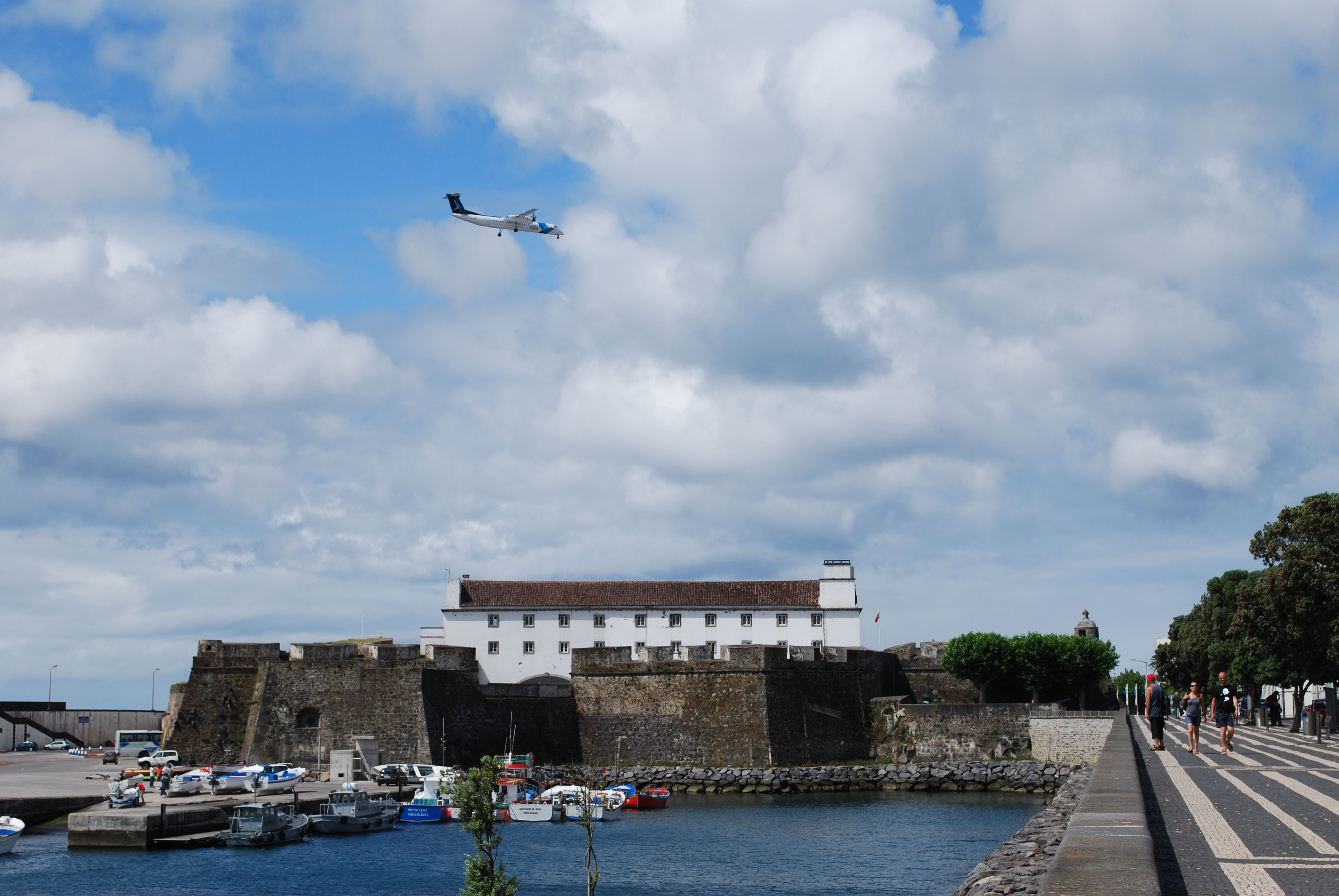 Vista do Forte de São Brás de Ponta Delgada desde a avenida Infante Don Henrique (fachada Este)